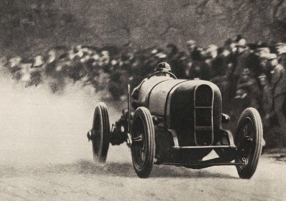 René Thomas vainqueur de la côte de Gaillon 1920 sur Sunbeam (Miroir des Sports du 14 octobre 1920)